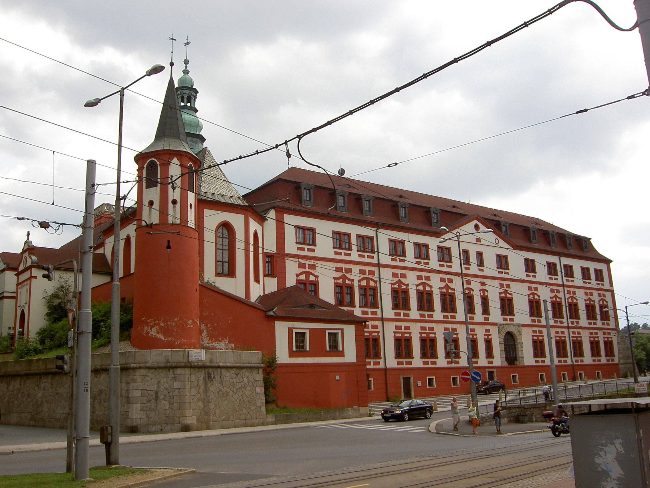 Liberecký zámek